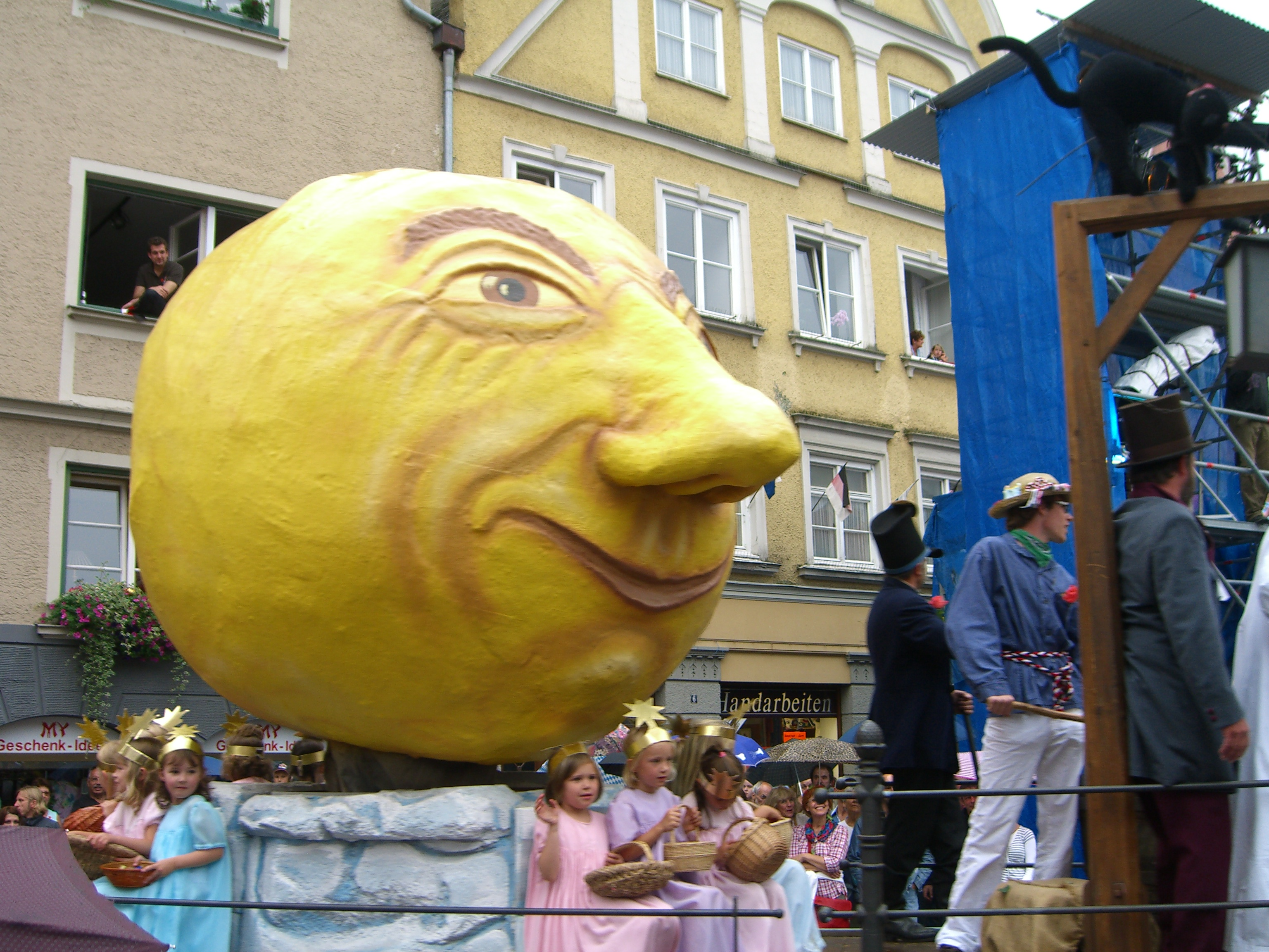 Der Wagen des Memminger Mau am Fischertagsumzug